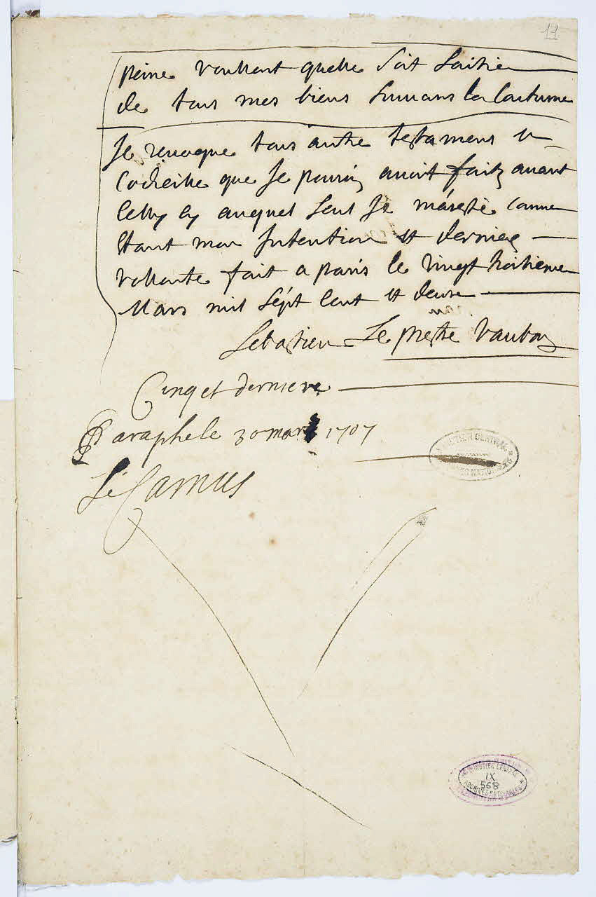 Dernière page du testament de Sébastien Le Prestre de Vauban, rédigé le 23 mars 1702 et enregistré en 1707